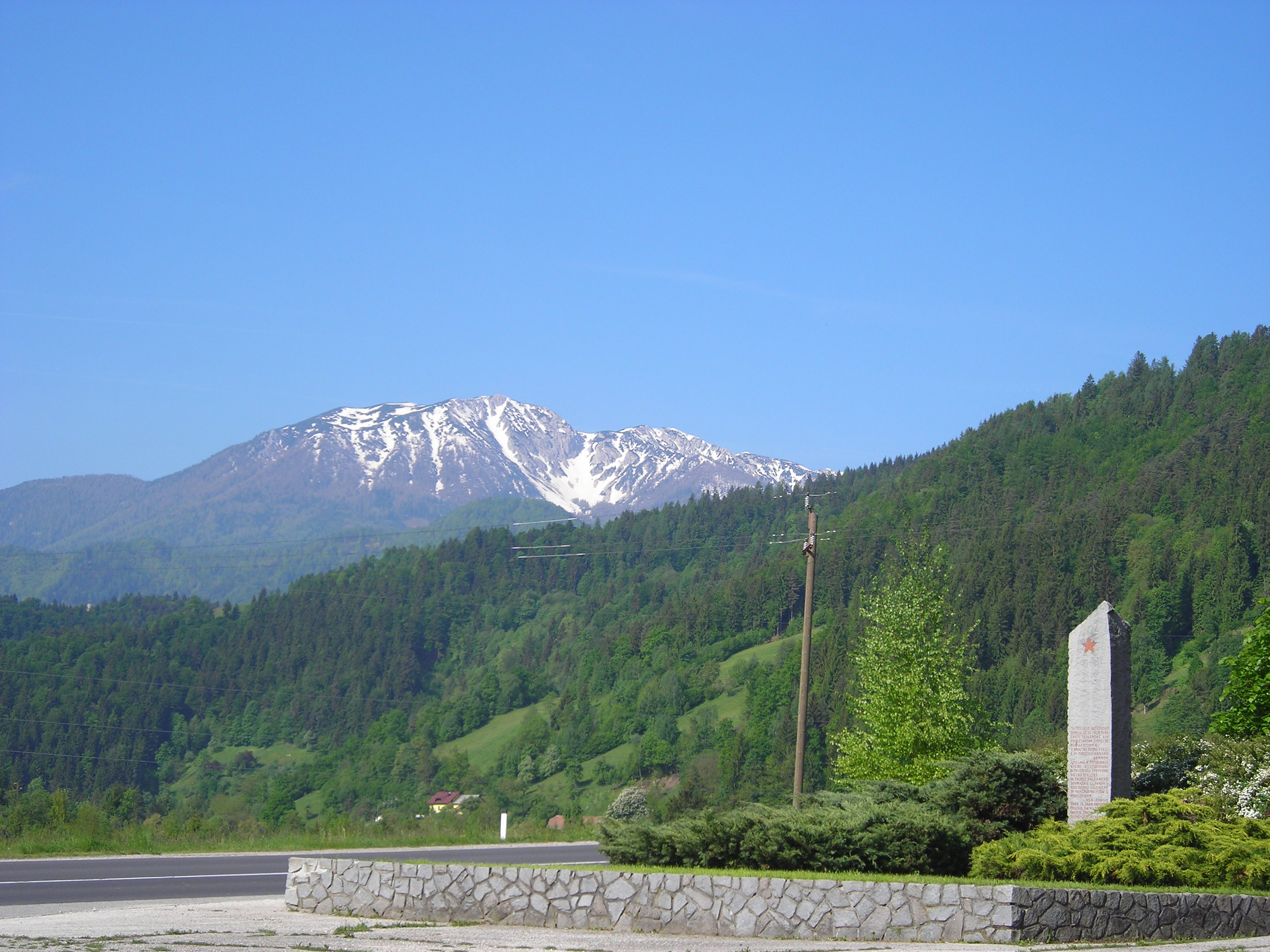 Poljana